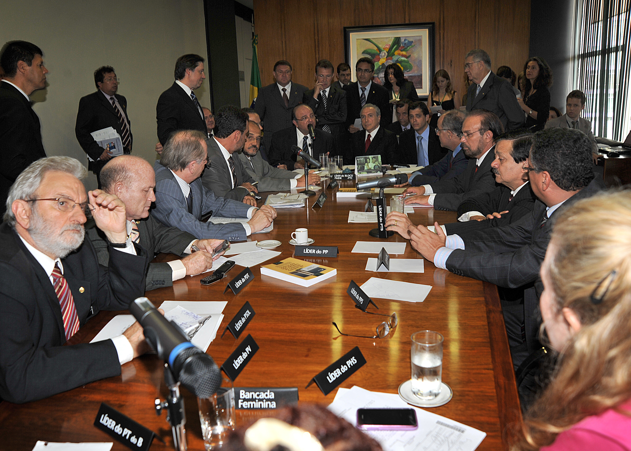 Brasília - Presidente da Câmara dos Deputados, Michel Temer, durante reunião de líderes partidários